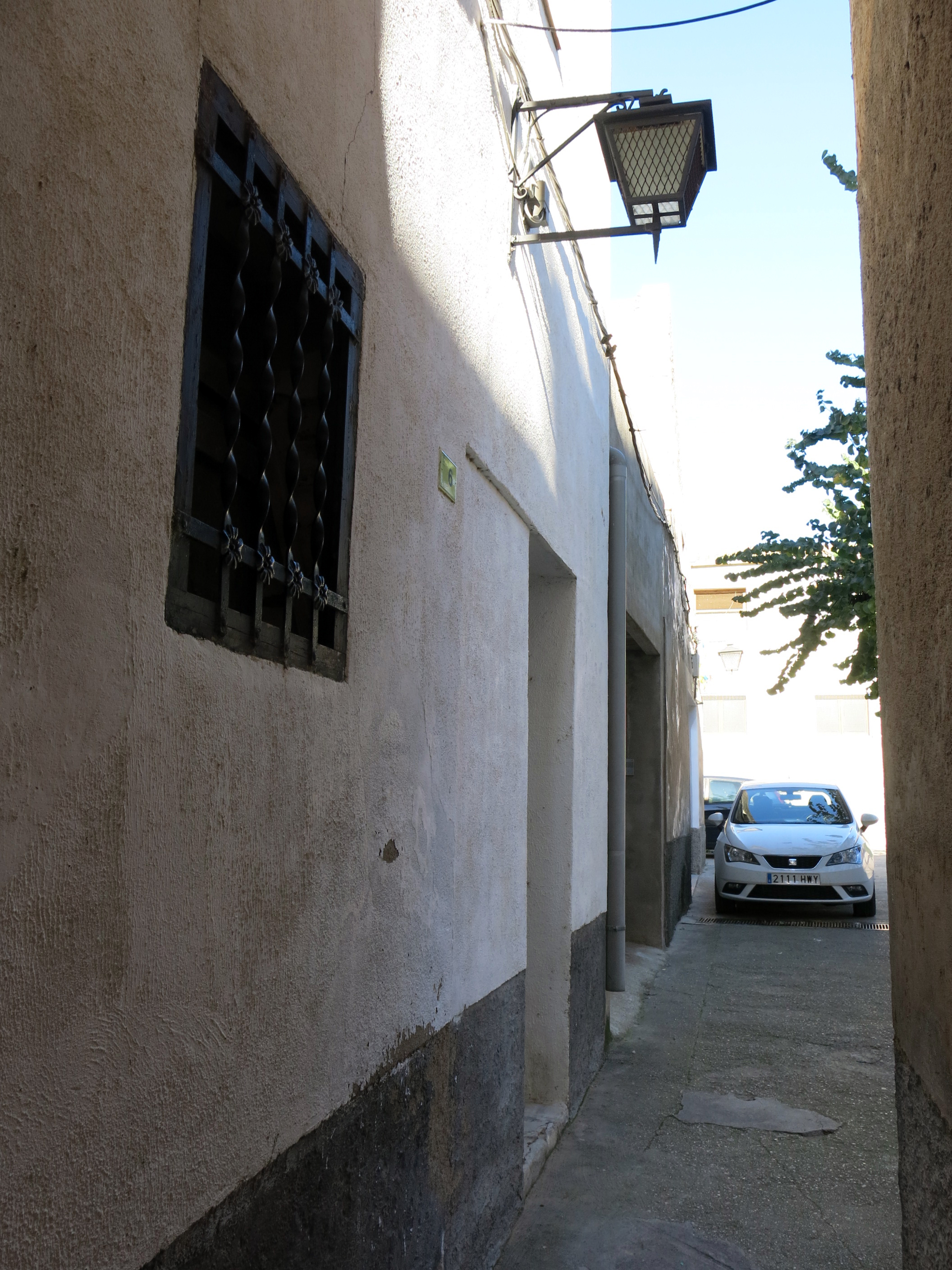 Carreró Segon de Vilanova (Tortosa)